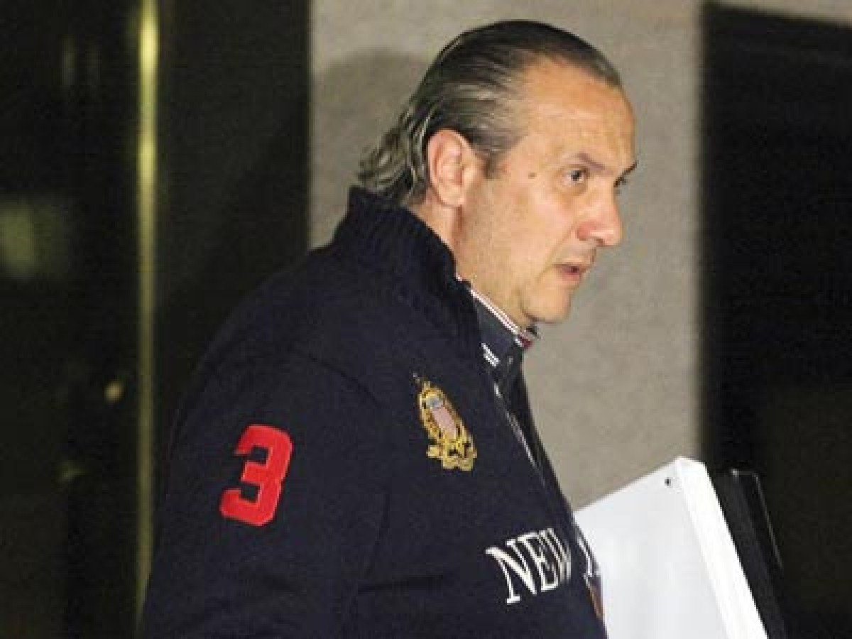 Jorge Dorribo